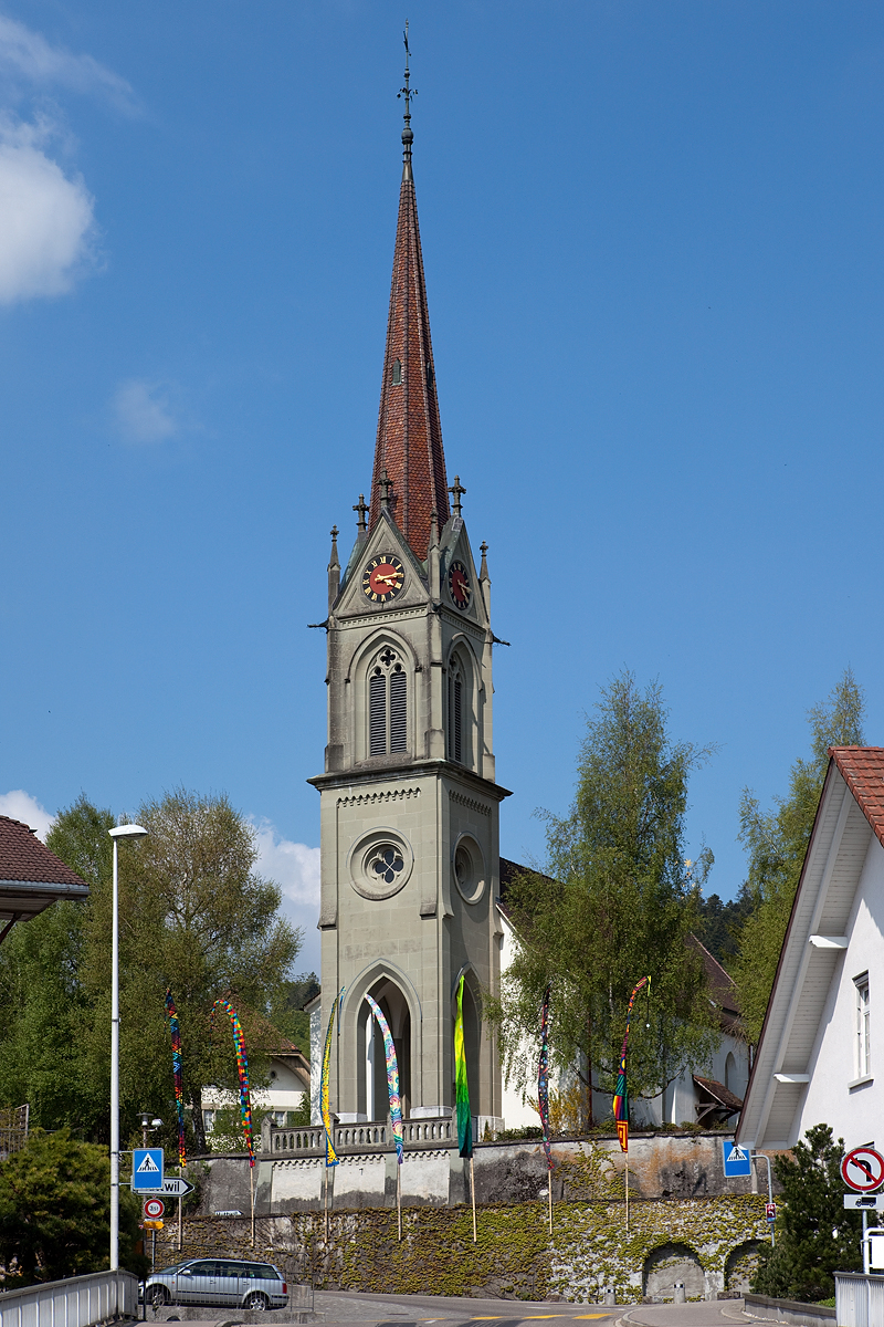 Kirche von Lützelflüh, in der Albert Bitzius (Jeremias Gotthelf) als Pfarrer wirkte